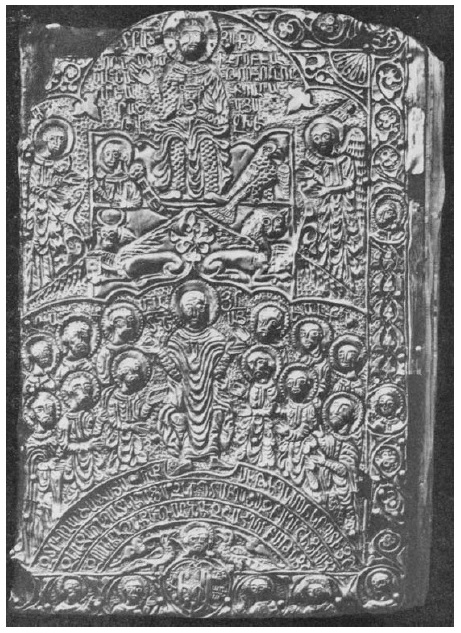 Оклад 1496 года из Муша. Страшный суд. Серебро, позолота. Художник Карапет Багишеци, ювелиры Скандар и Шагубад